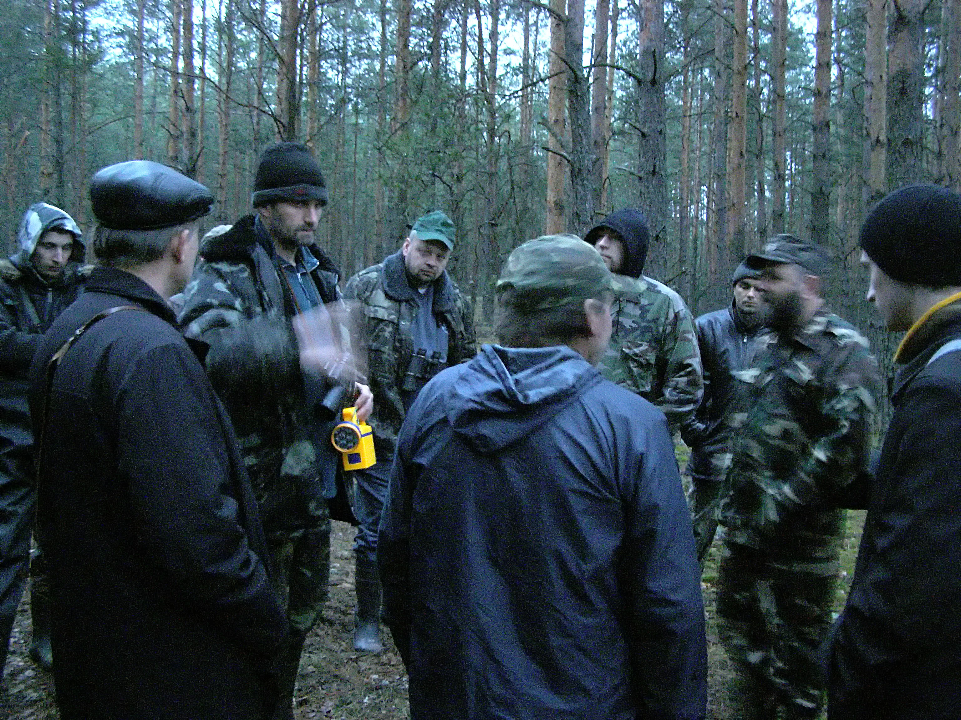 Орнітологічна екскурсія у 2010 році